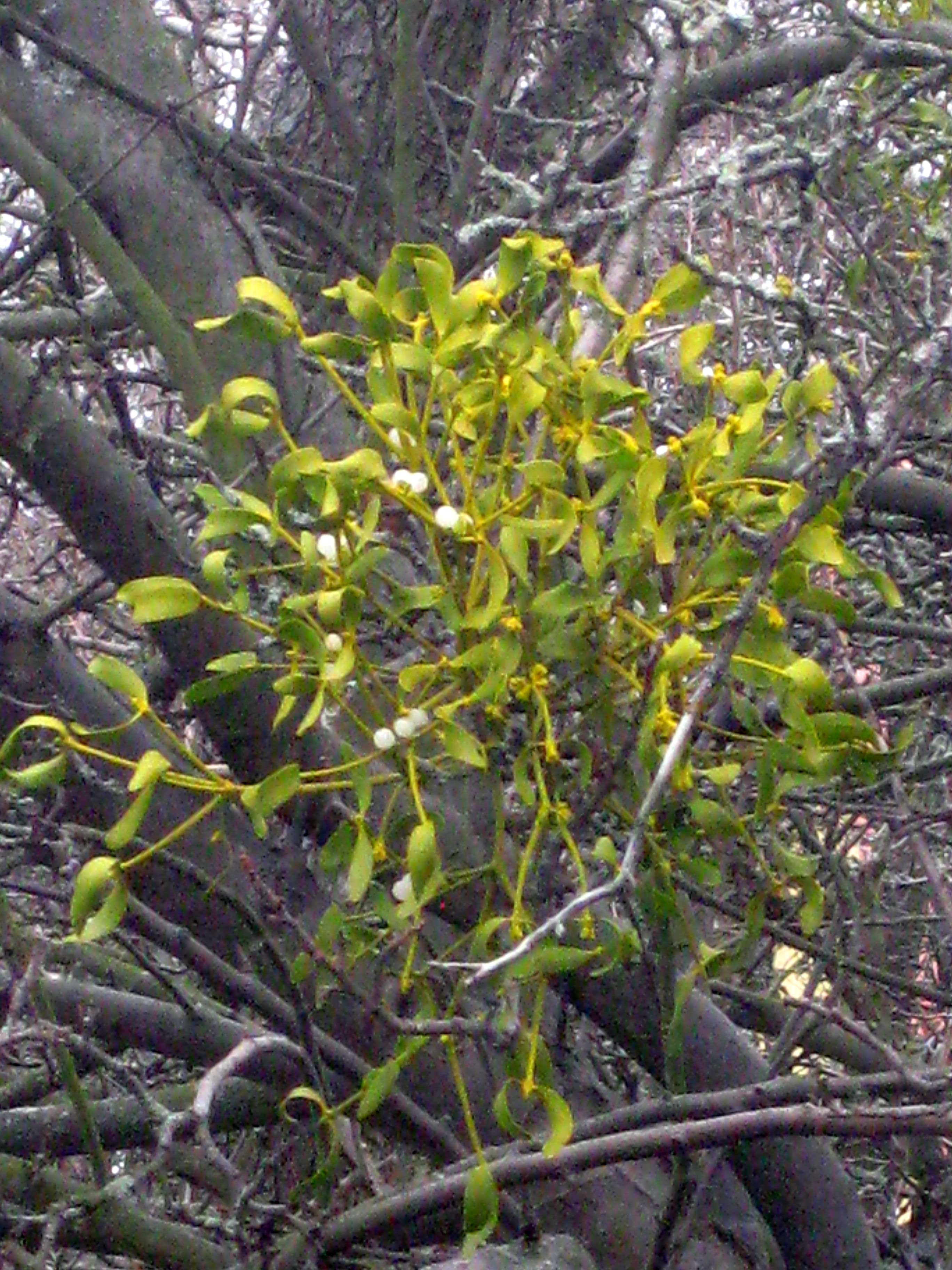 Ruhland, Bernsdorfer Straße 36, Laubholz-Mistel (Viscum album), fruchttragend, auf Apfelbaum (Malus domestica), Vorwinter